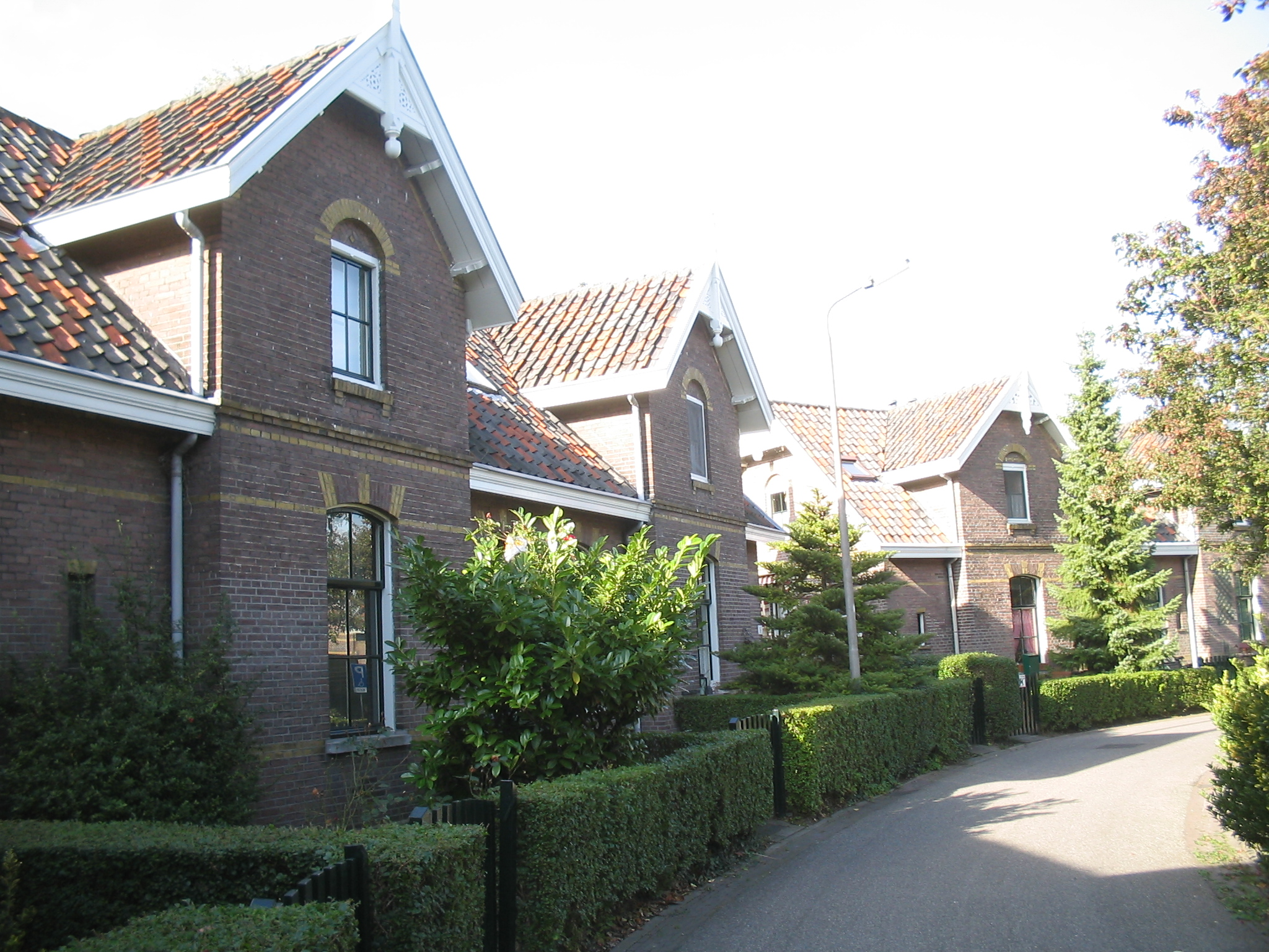 Agnetapark, Delft, 18 oktober 2005